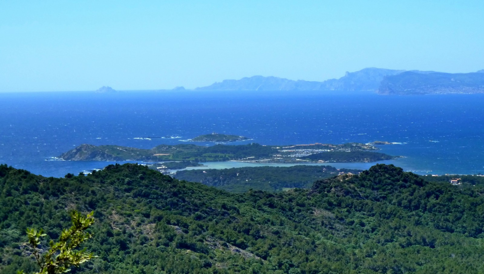 L'archipel des Embiez vu depuis le cap Sicié (Six-Fours - France)